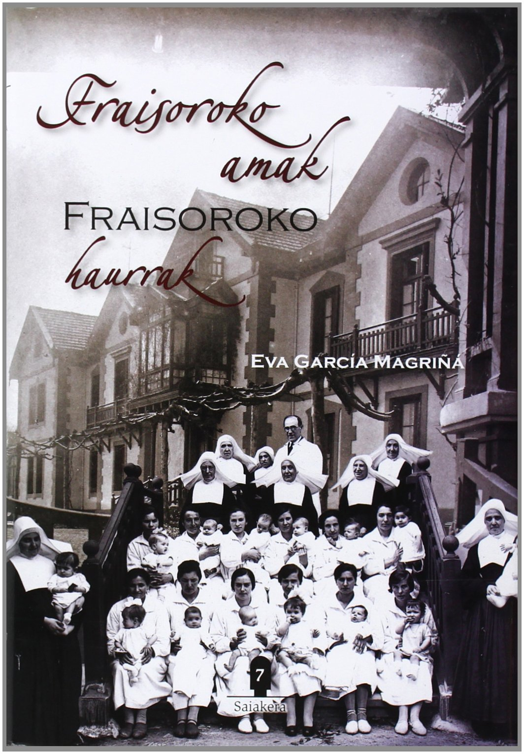 Fraisoroko haurrak, Fraisoroko amak liburua